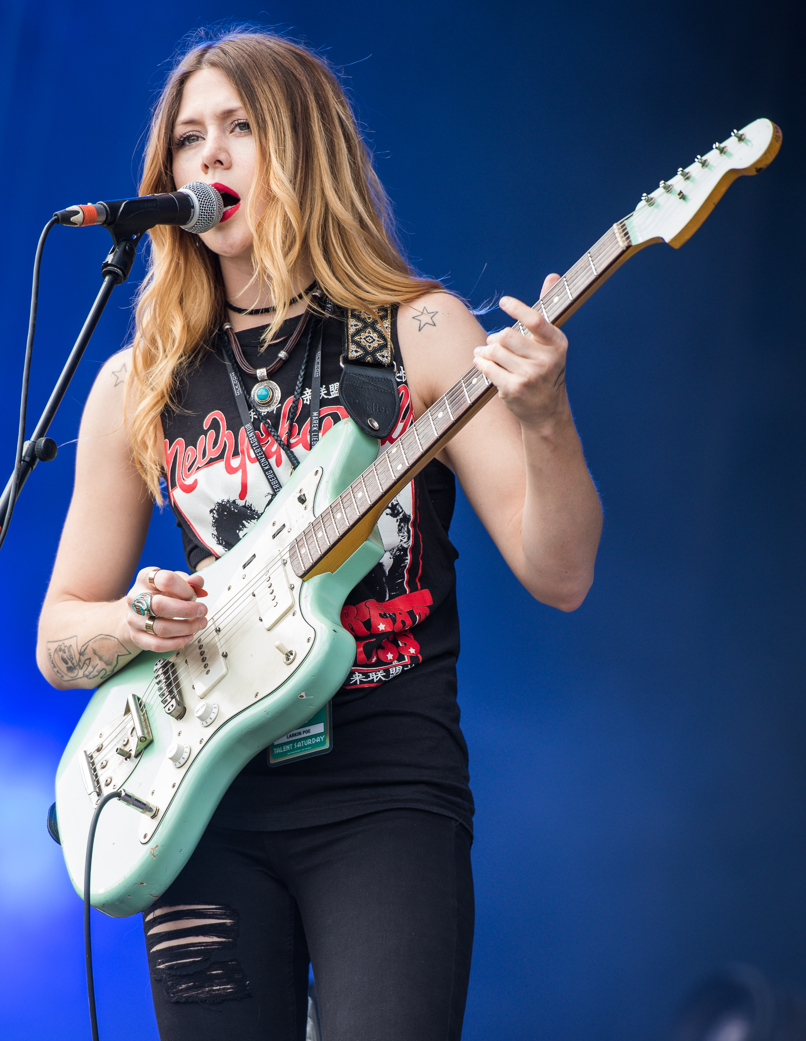 ARGO-Konzerte,Beck's Park Stage,Festival,Konzert,Larkin Poe,Livekonzert,Livemusik,Musik,Rebecca Lovell,RiP,Rock im Park 2016